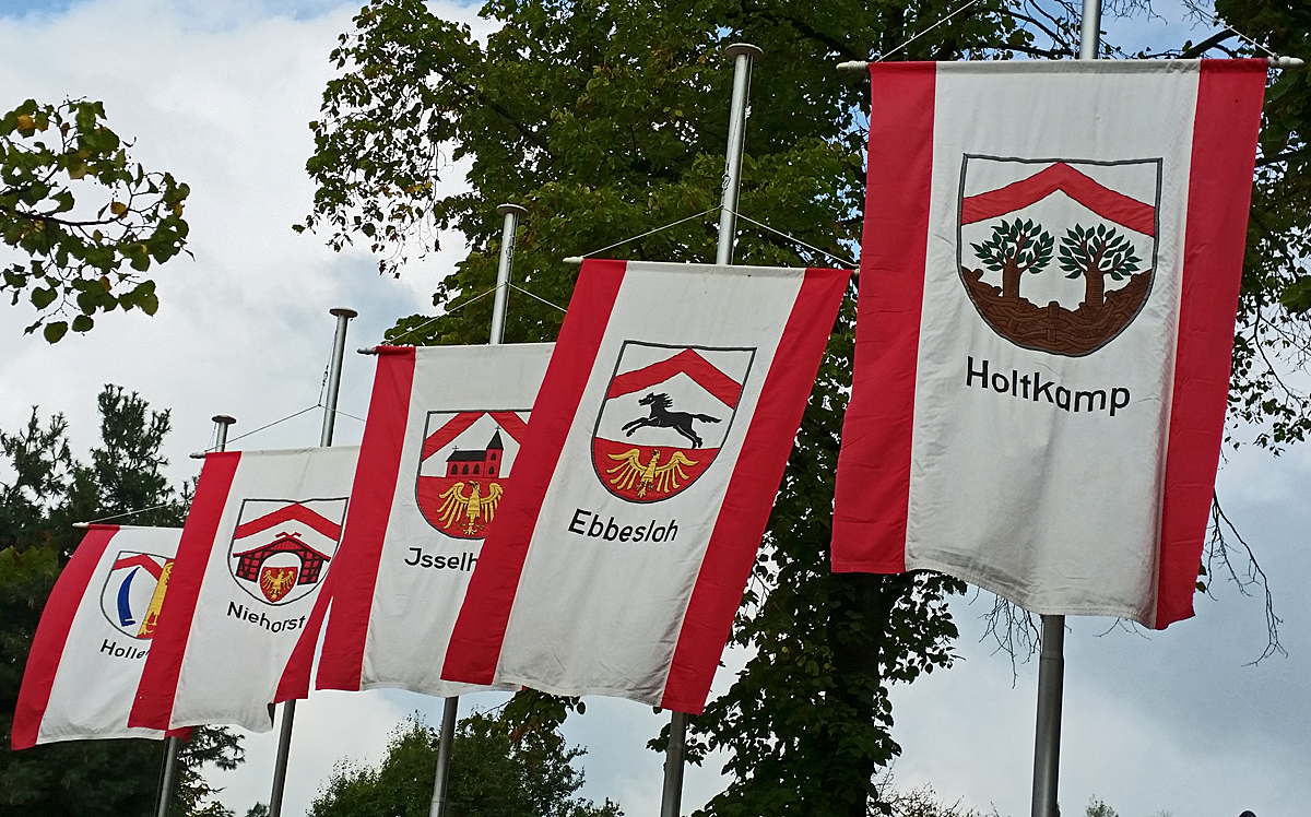 Banner mit den Wappen der ehemals selbständigen Gemeinden des Kirchspiels Isselhorst, Westfalen